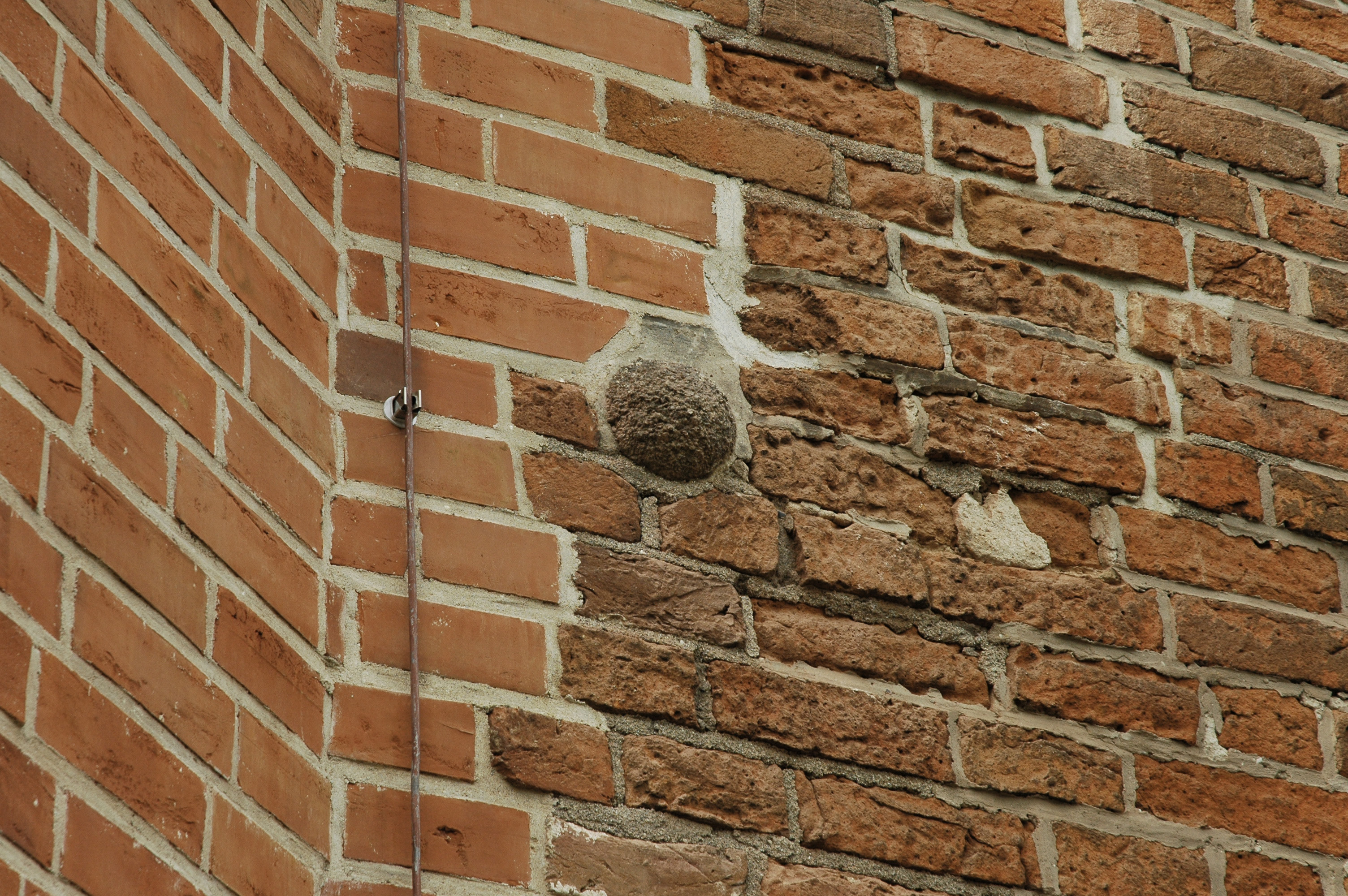 Kanonenkugel in der Kirchenwand